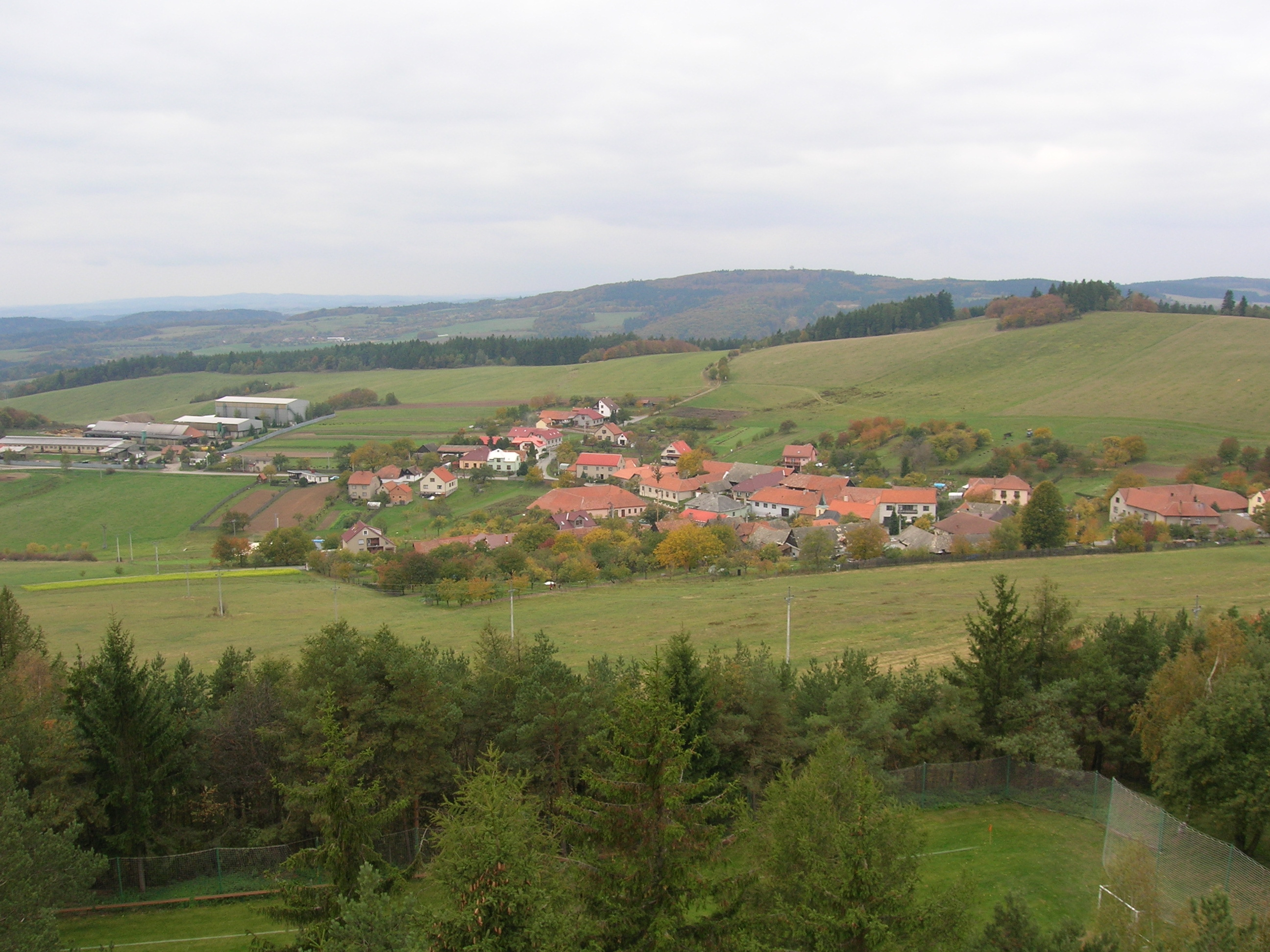 Kozárov